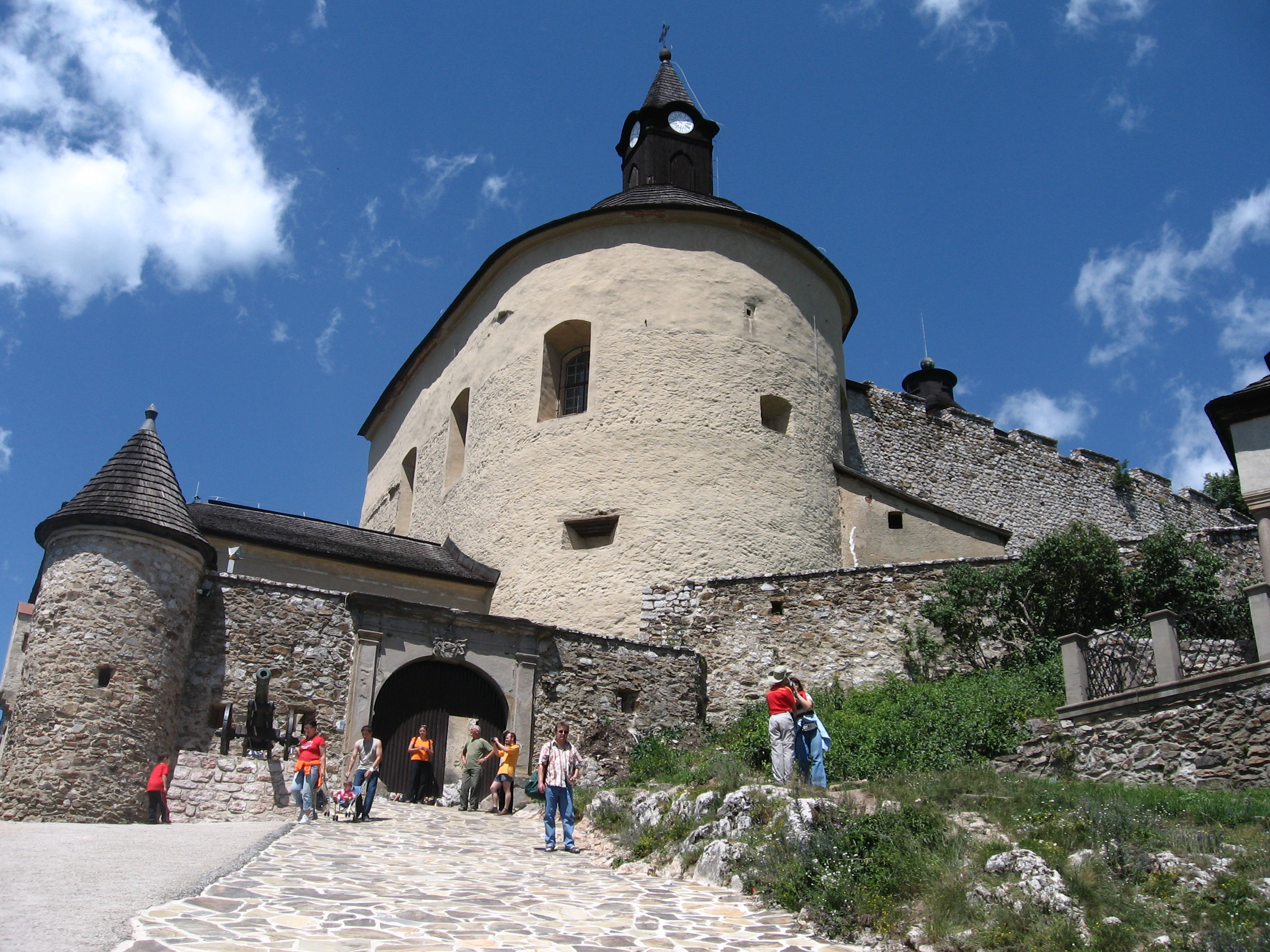 Krásna Hôrka, vstupná brána